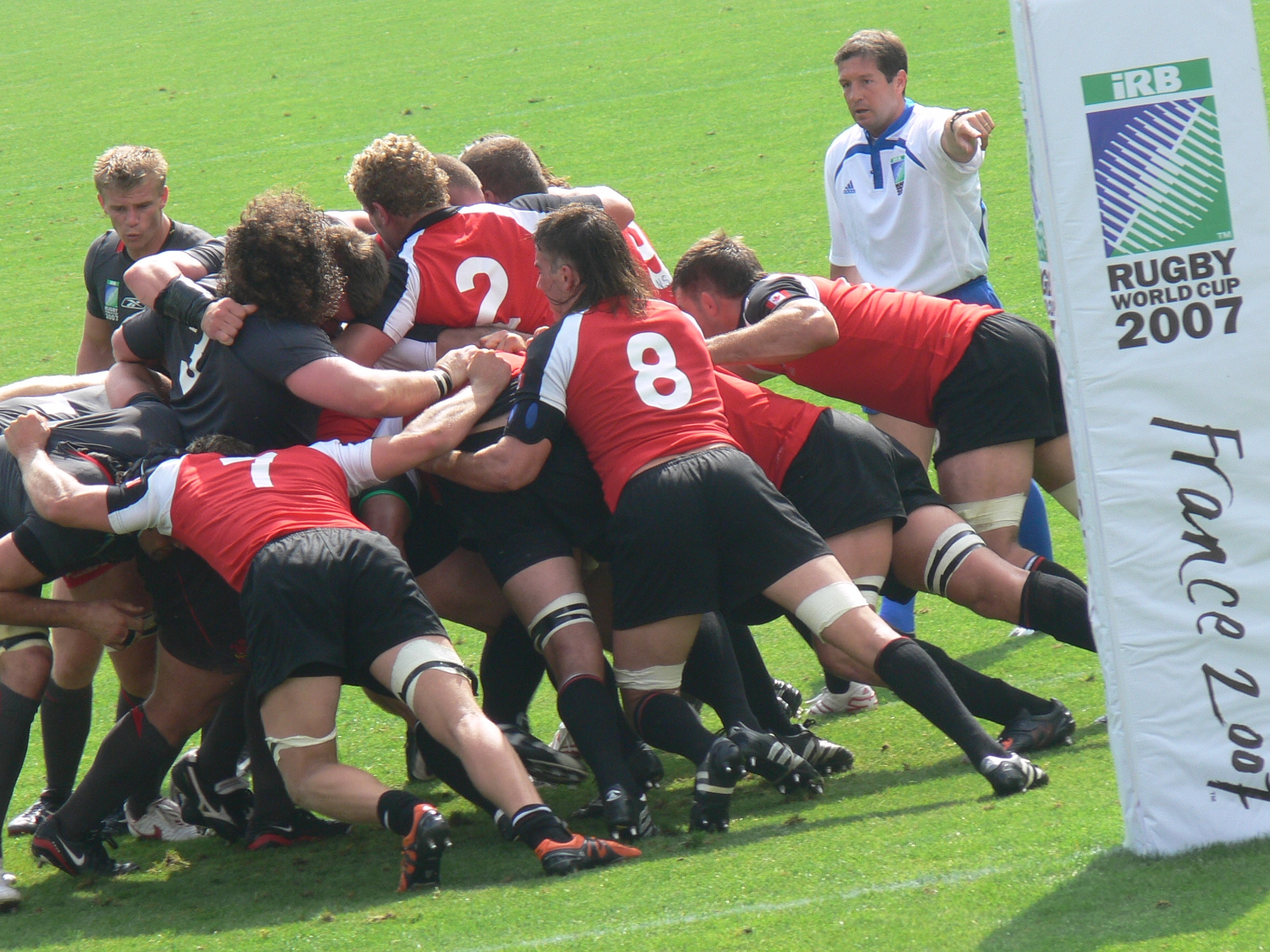 Rugby World Cup 2007 : Wales vs Canada // Coupe du monde 2007 : Pays de Galles contre Canada